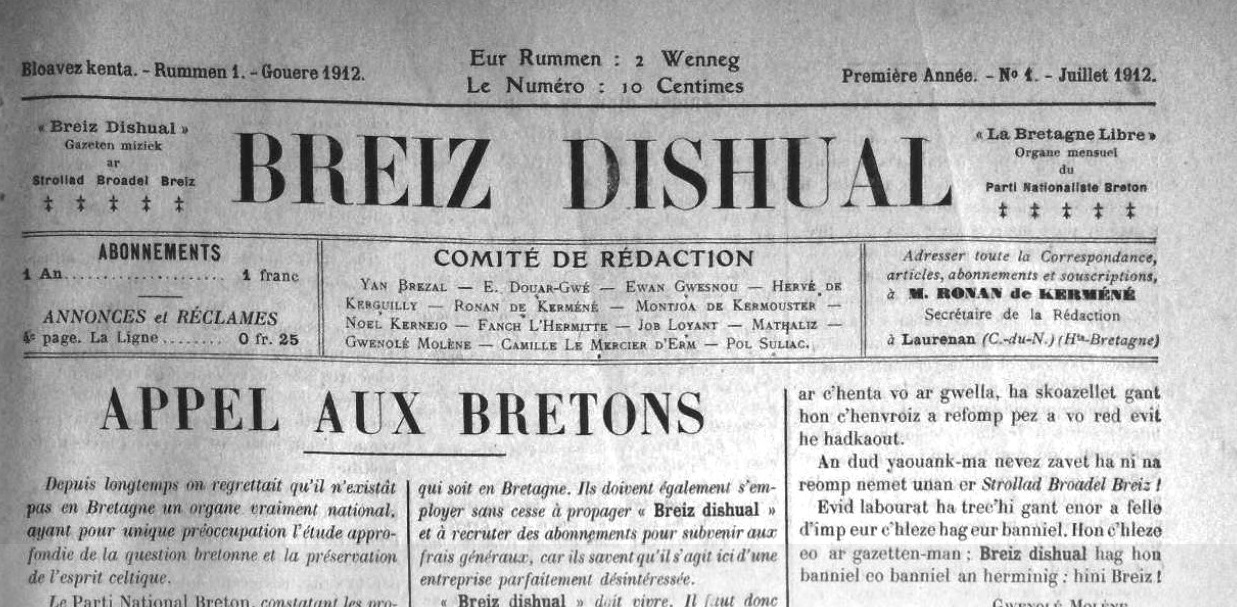 journal Breiz Dishual - N°1 juillet 1912 - en-tête